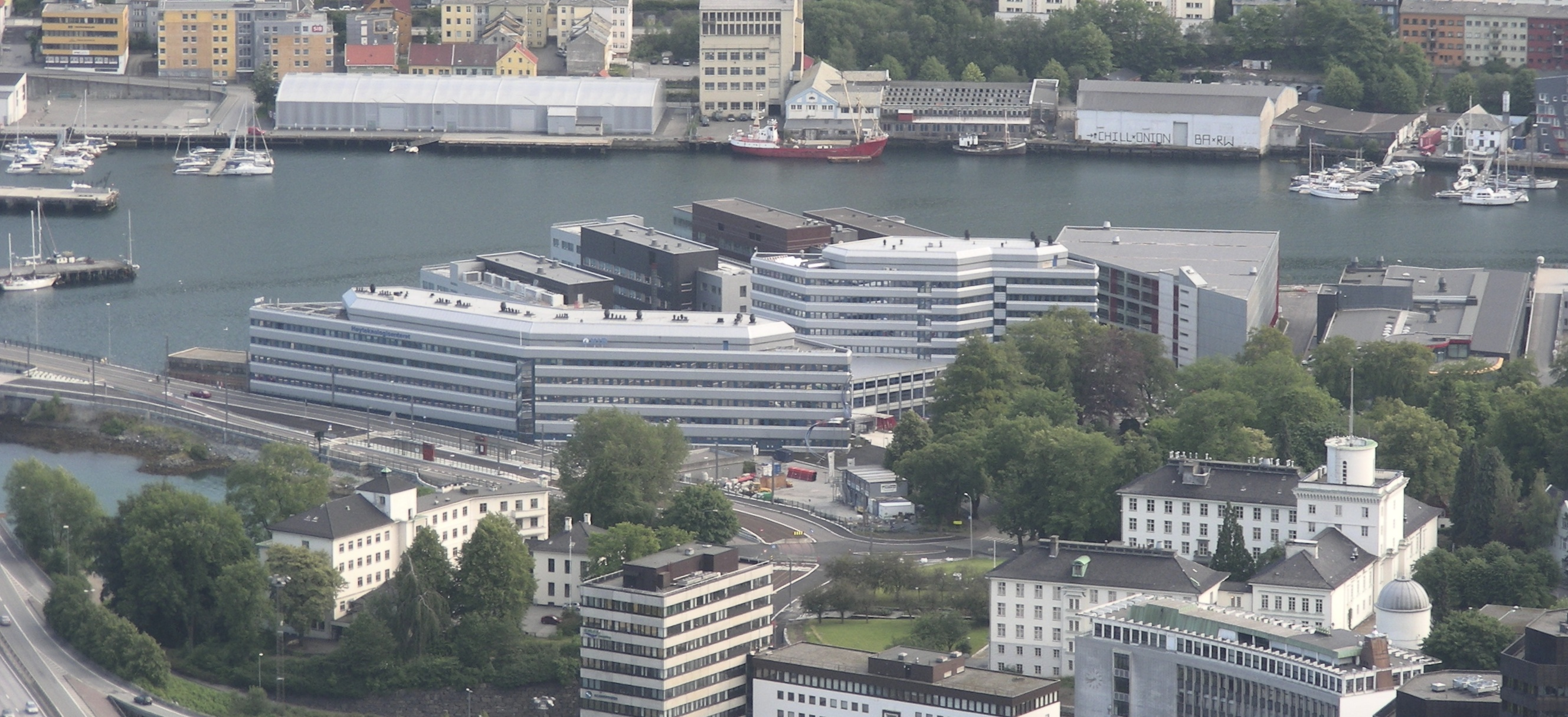 Høyteknologisenteret i Bergen med Bioblokken til venstre og Datablokken til høyre. Geofysen ligger foran, nede til høyre.